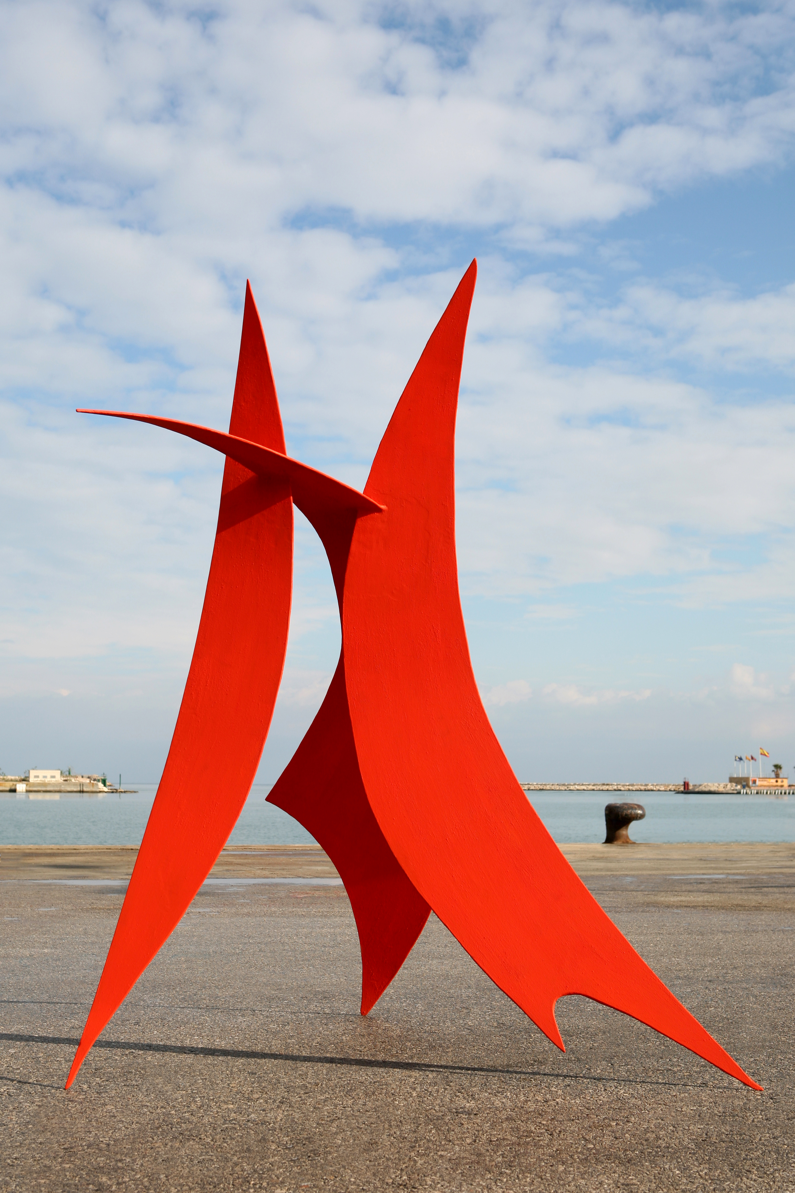 Escultura en acero y color de 2 x 2 x 1.60 metros